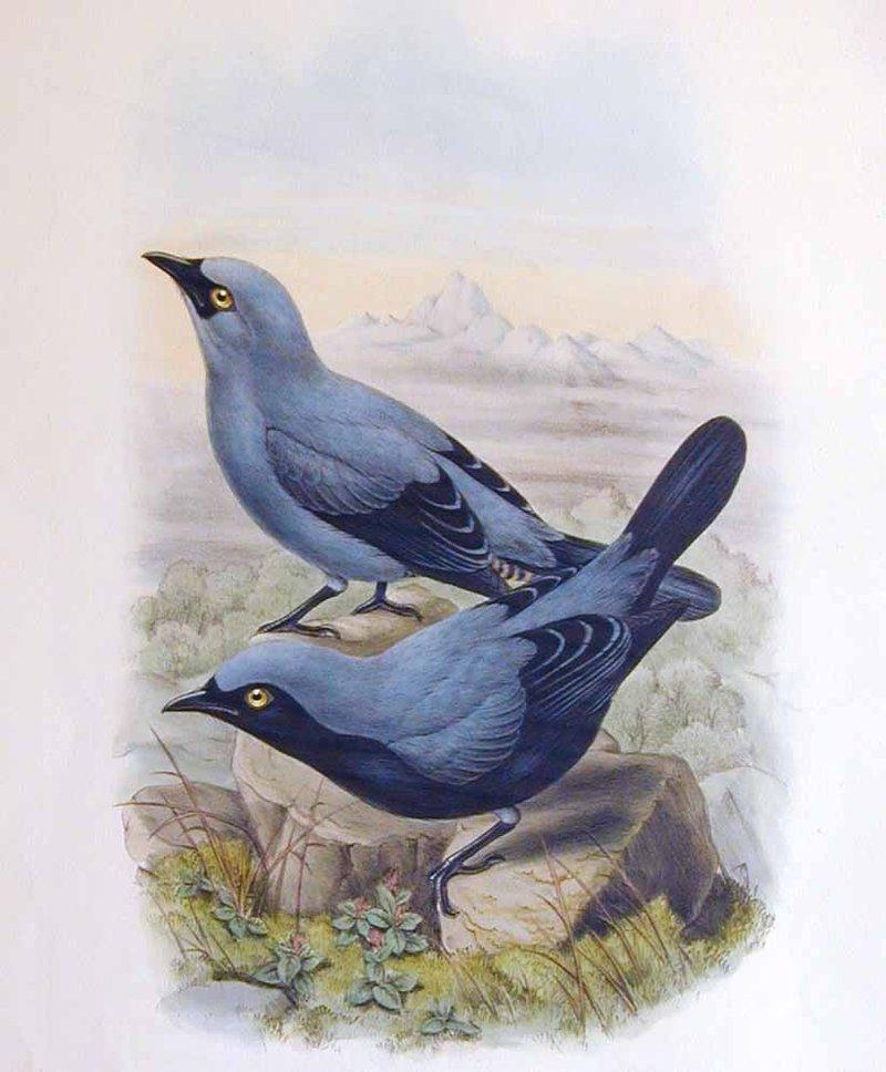 Échenilleur à ventre noir